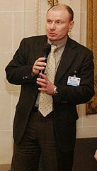 Vladimir Potanin, Russian businessman